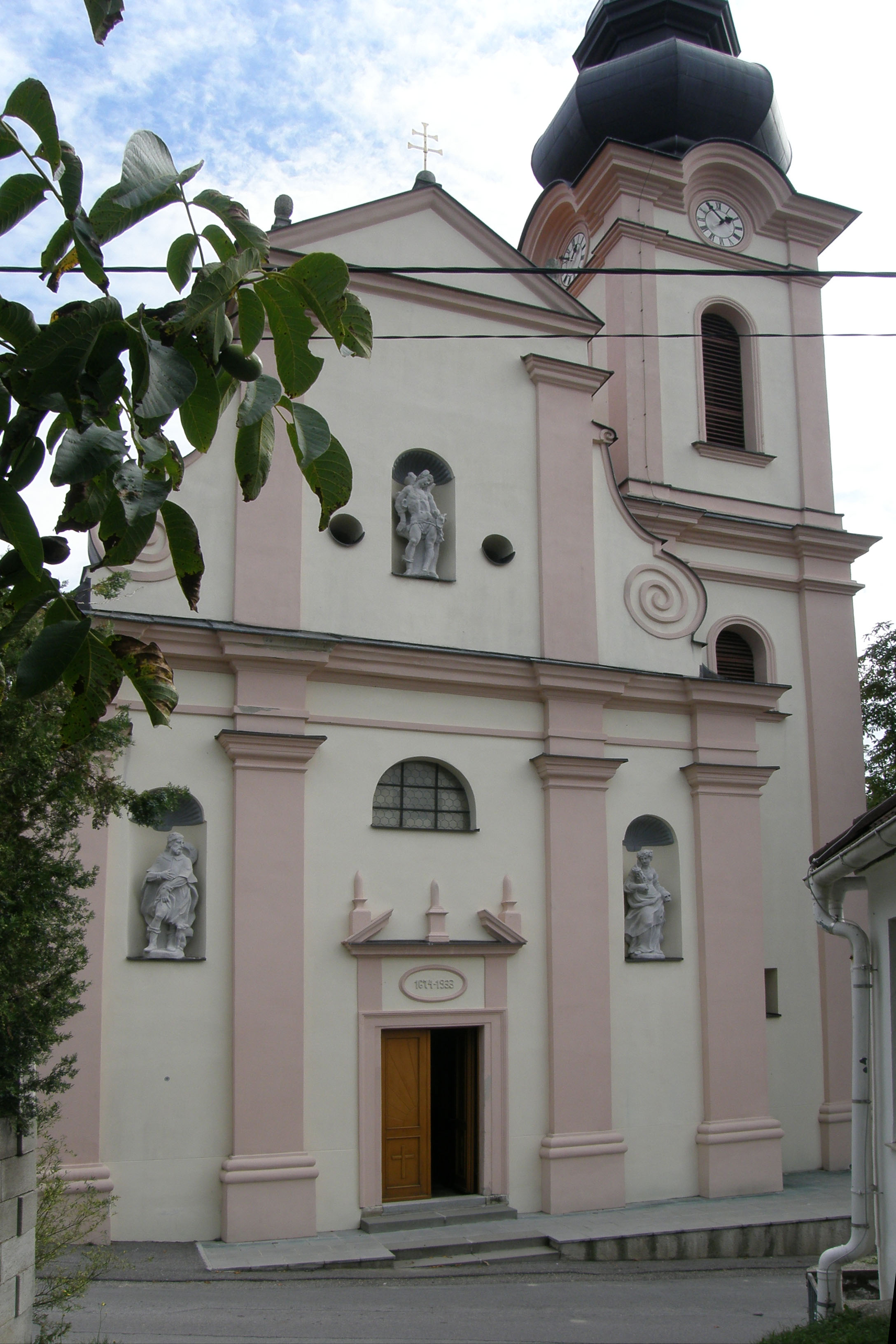 Kath. Pfarrkirche hl. Sebastian mit ehem. Friedhof